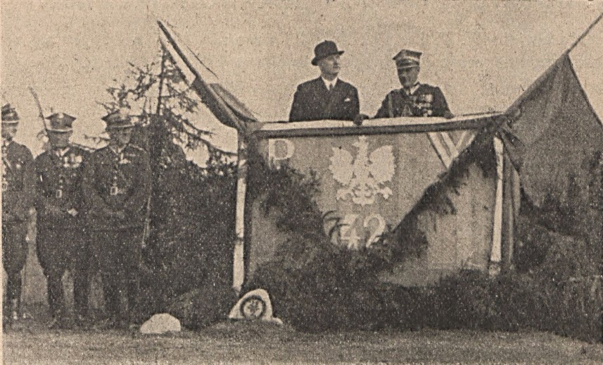 Na trybunie p. gen. Młot – Fijałkowski d-ca łomżyńskiej dywizji piechoty i p. Jankowski v-ce wojewoda białostocki obok płk. dypl. Porczyński d-ca pułku ułanów litewskich. Miejsce: Wysokie Mazowieckie.